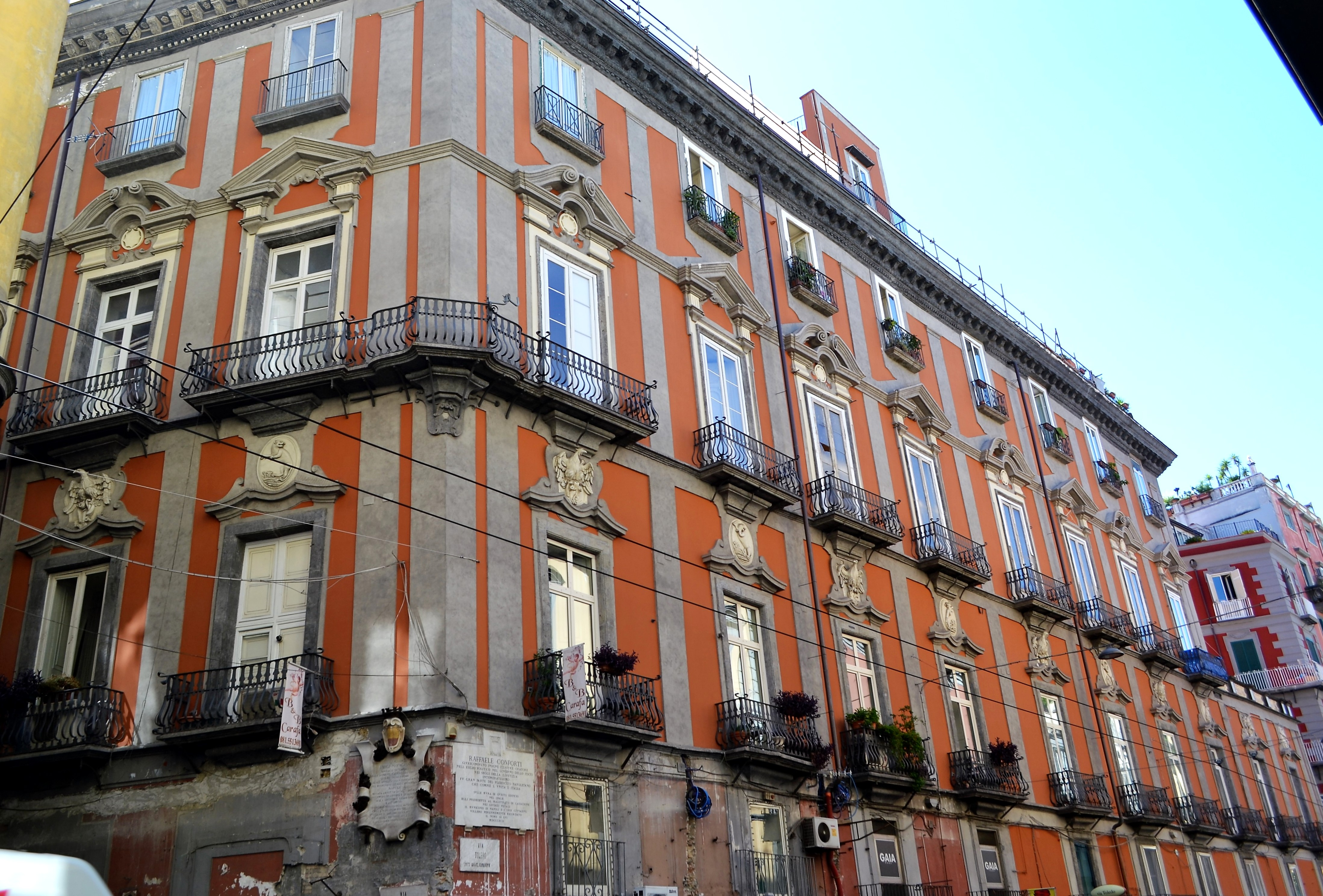 Palazzo Carafa di Maddaloni (facciata su via Toledo) - Napoli